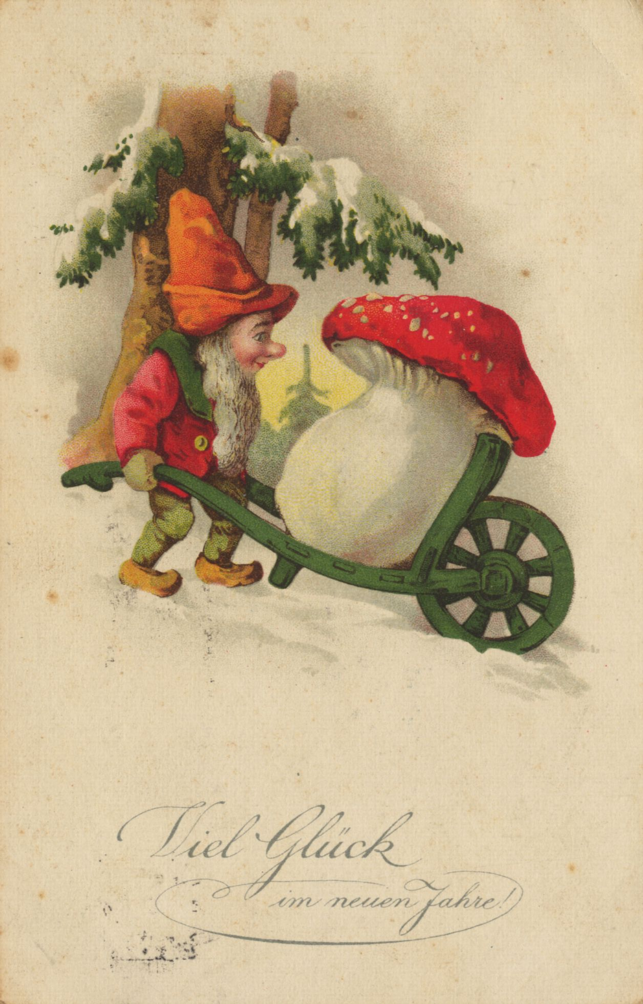 Postkarte mit Zwerg und Fliegenpilz